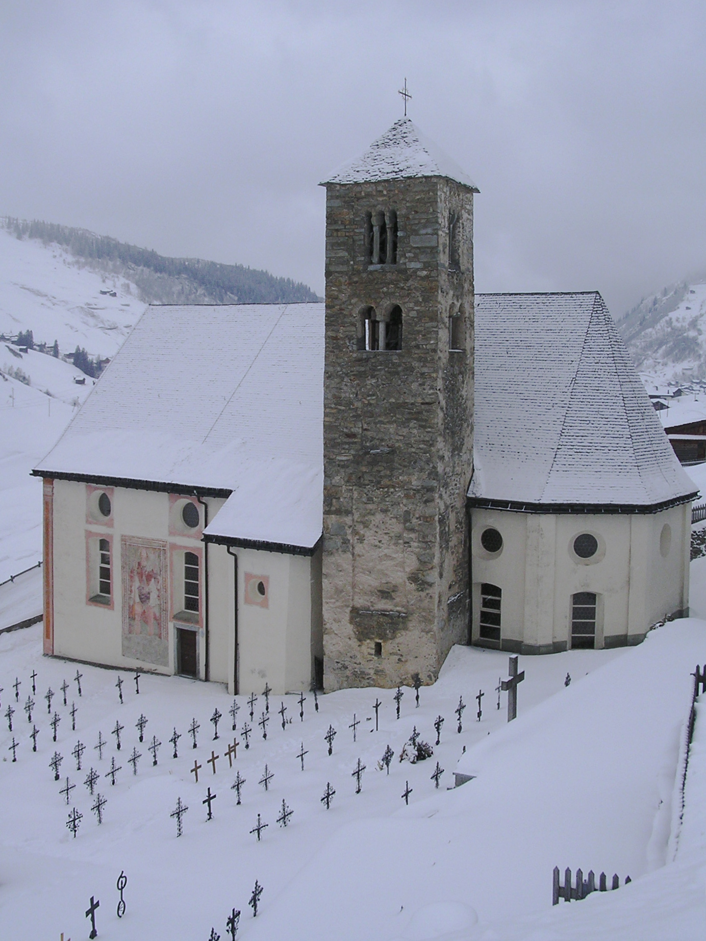 Kirche von Platta GR, Schweiz, im Winter